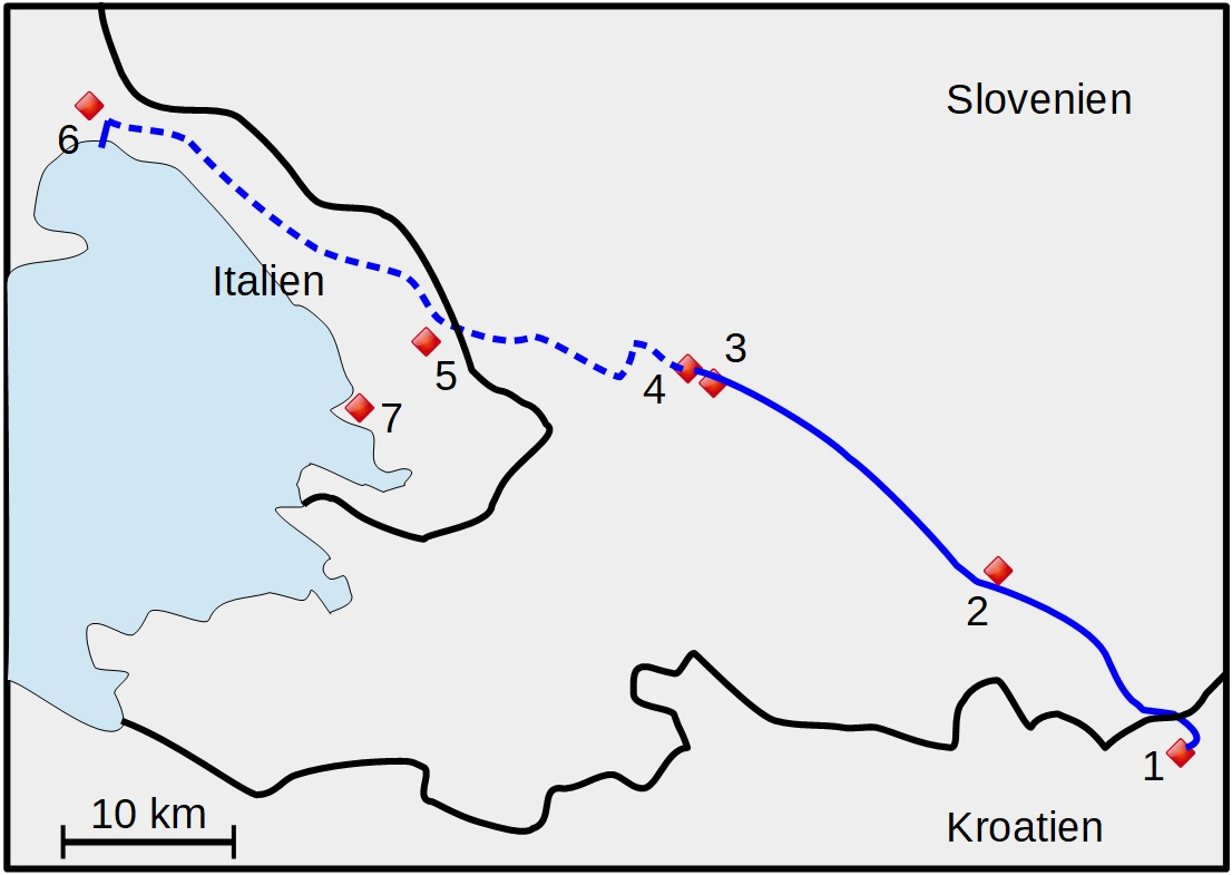 Ungefärlig karta över Reka-Timavo. Streckad linje visar flodens underjordiska sträckning (efter Alexander, Paul B.: The Reka-Timavo River System of the Yugoslavian and Italian Karst. Yearbook of the Association of Pacific Coast Geographers Vol. 32 (1970), p. 159). 1=Vela Voda (flod). 2=Ilirska Bistrica. 3=Vremski Britof. 4=Škocjan. 5=Trebiciano. 6=Monfalcone. 7=Trieste